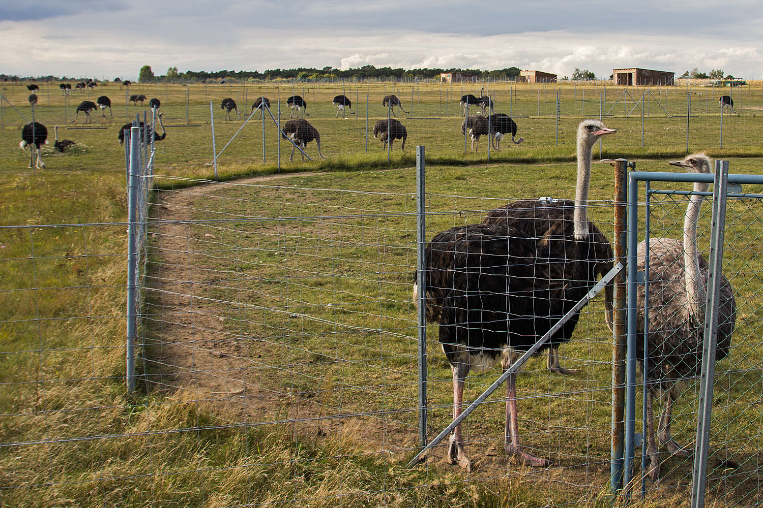 Bad Düben Straußenfarm